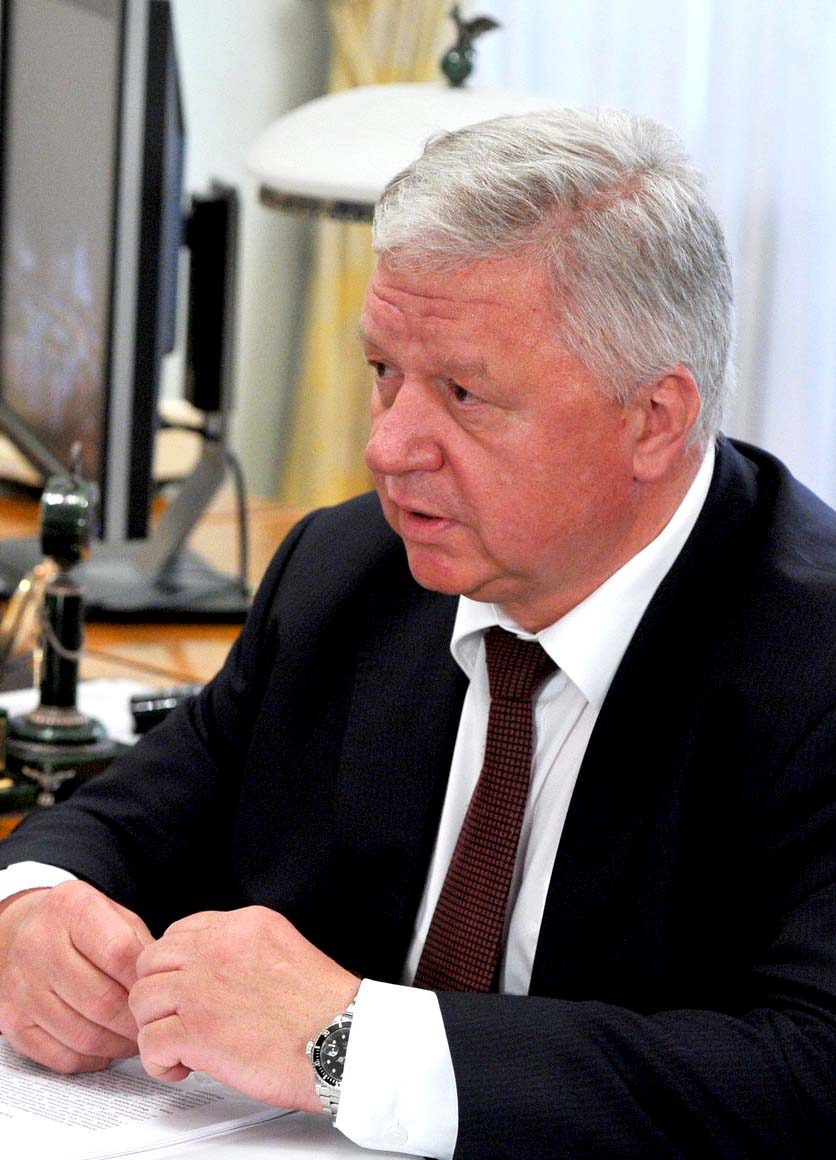 Председатель Федерации независимых профсоюзов России Михаил Шмако